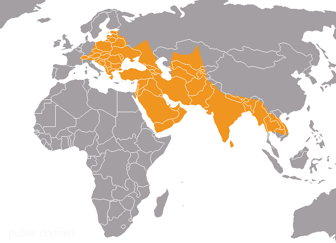 Der Lebensraum des Goldschakals (Canis aureus)